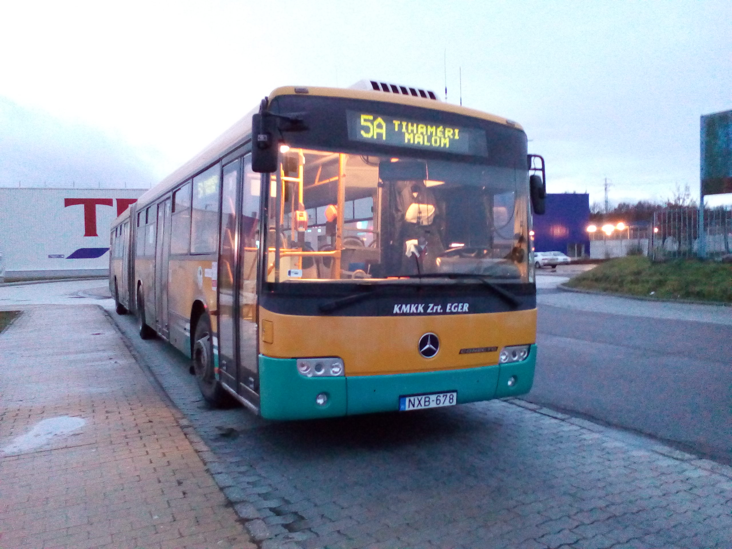 5A busz (Mercedes-Benz Conecto, NXB-678), Eger